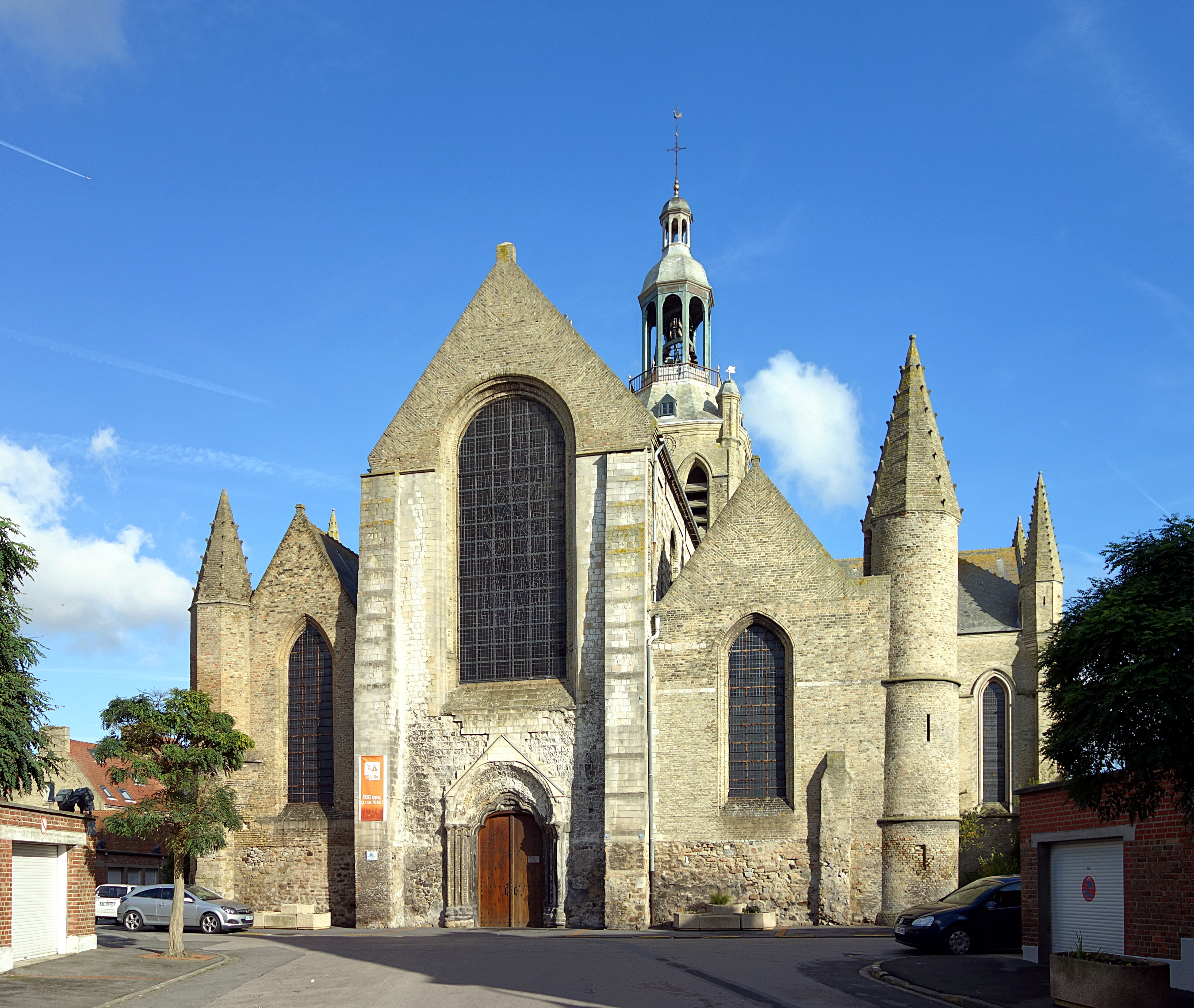 L'église Saint-Jean-Baptiste à Bourbourg (Nord).